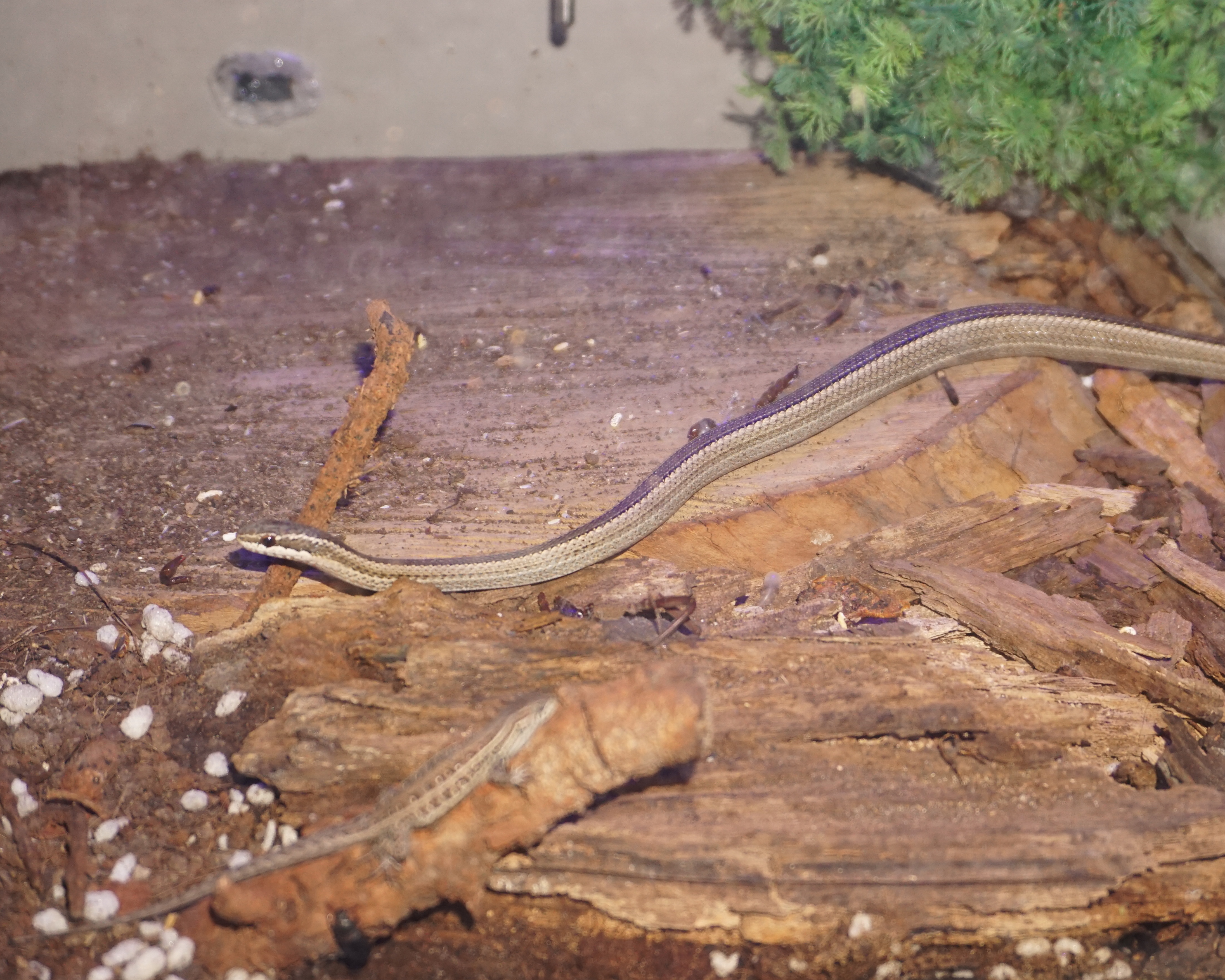 CULEBRA CHILENA FUE ENCONTRADA BOSQUE NATIVO PANUL -CHILE/SANTIAGO/LA FLORIDA